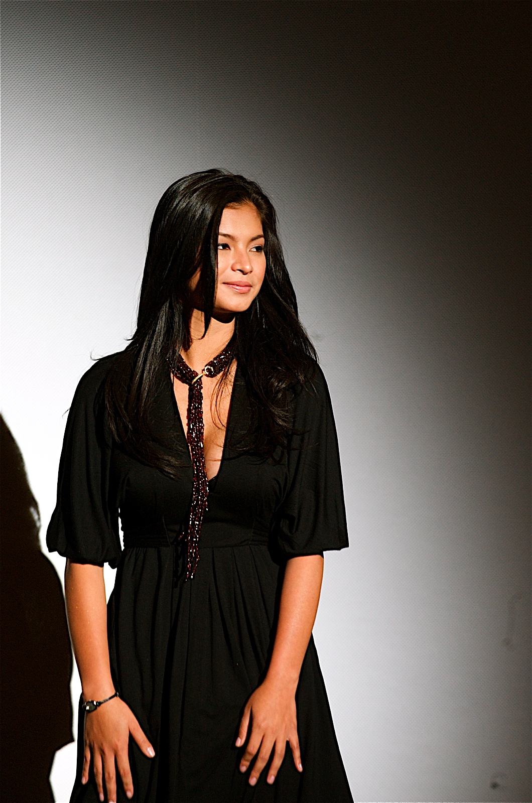 Angel Locsin, Filipino actress